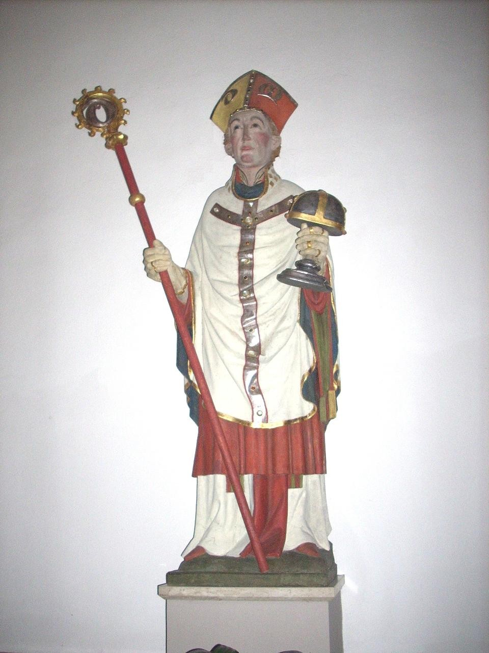 St. Godehard Basilika, Hildesheim, St. Godehard mit dem Hildesheimer Marienreliquiar